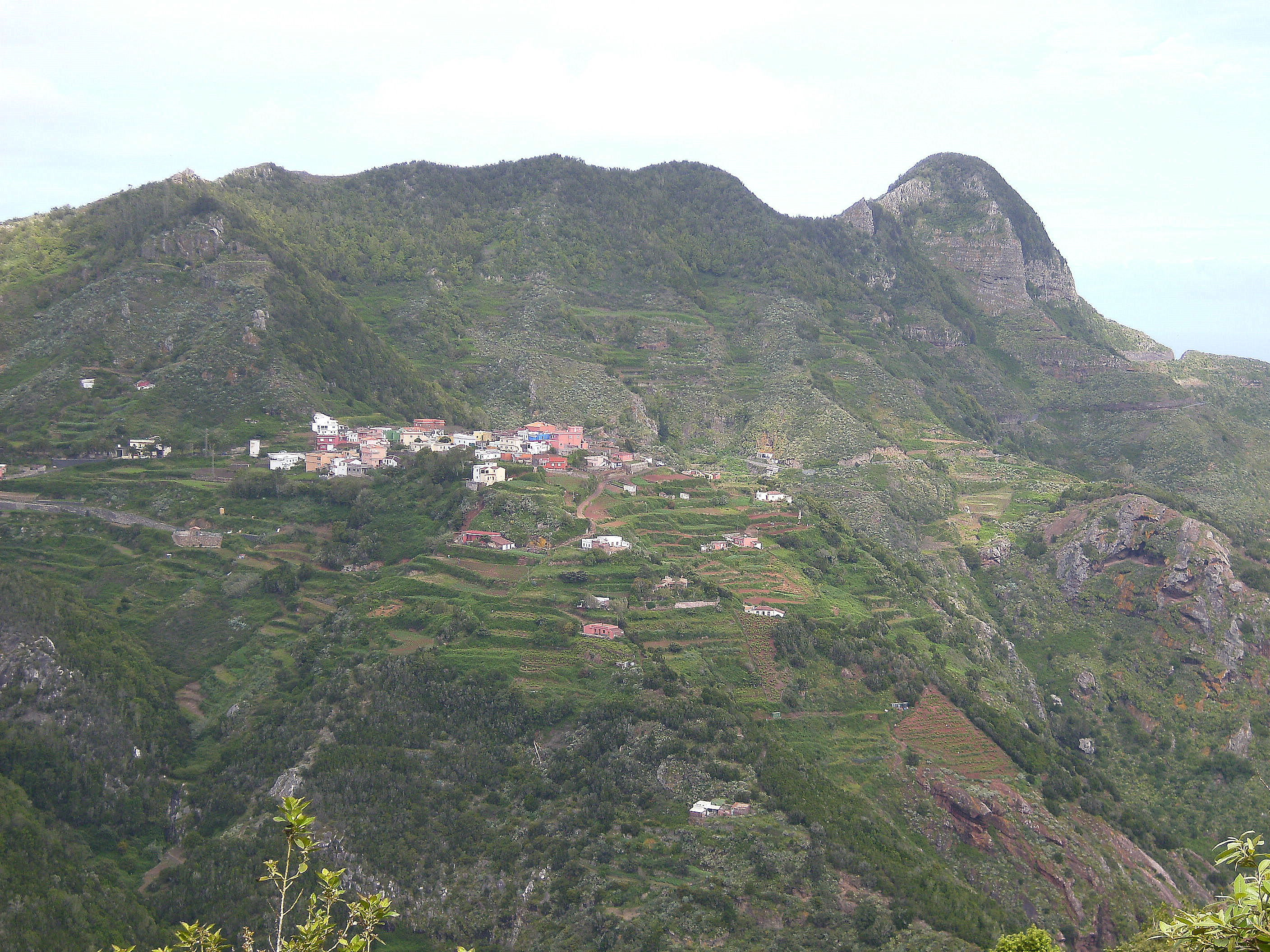 Vista del caserío de Las Carboneras bajo el Cabezo Tenejía